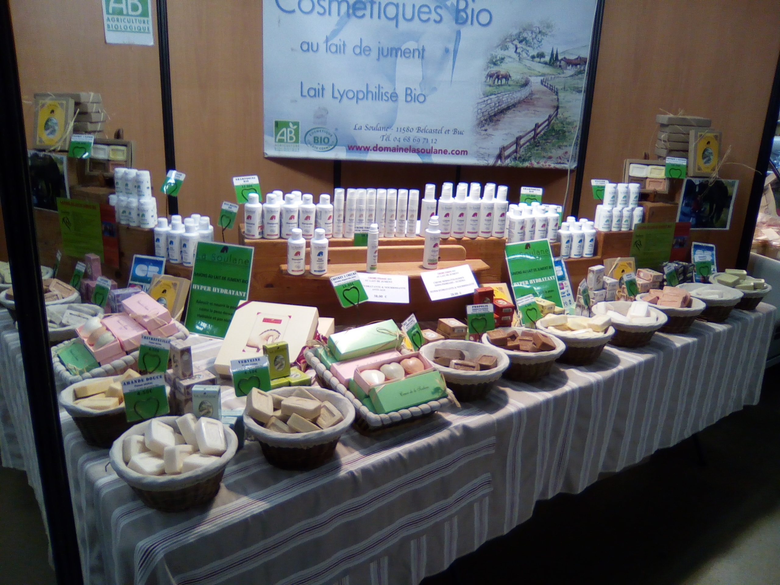 Marché de noël Pari fermier 2018, au Parc floral de Paris.